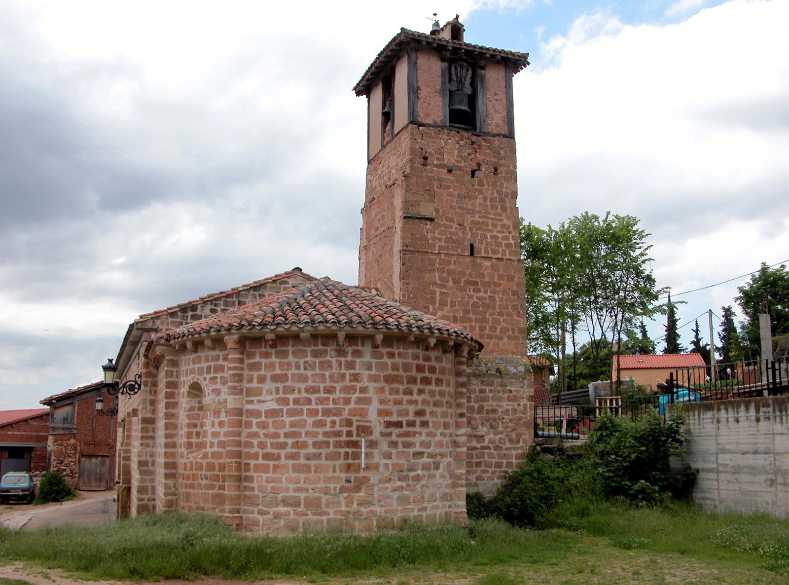 Iglesia de Santa María en Ledesma de la Cogolla, La Rioja - España.